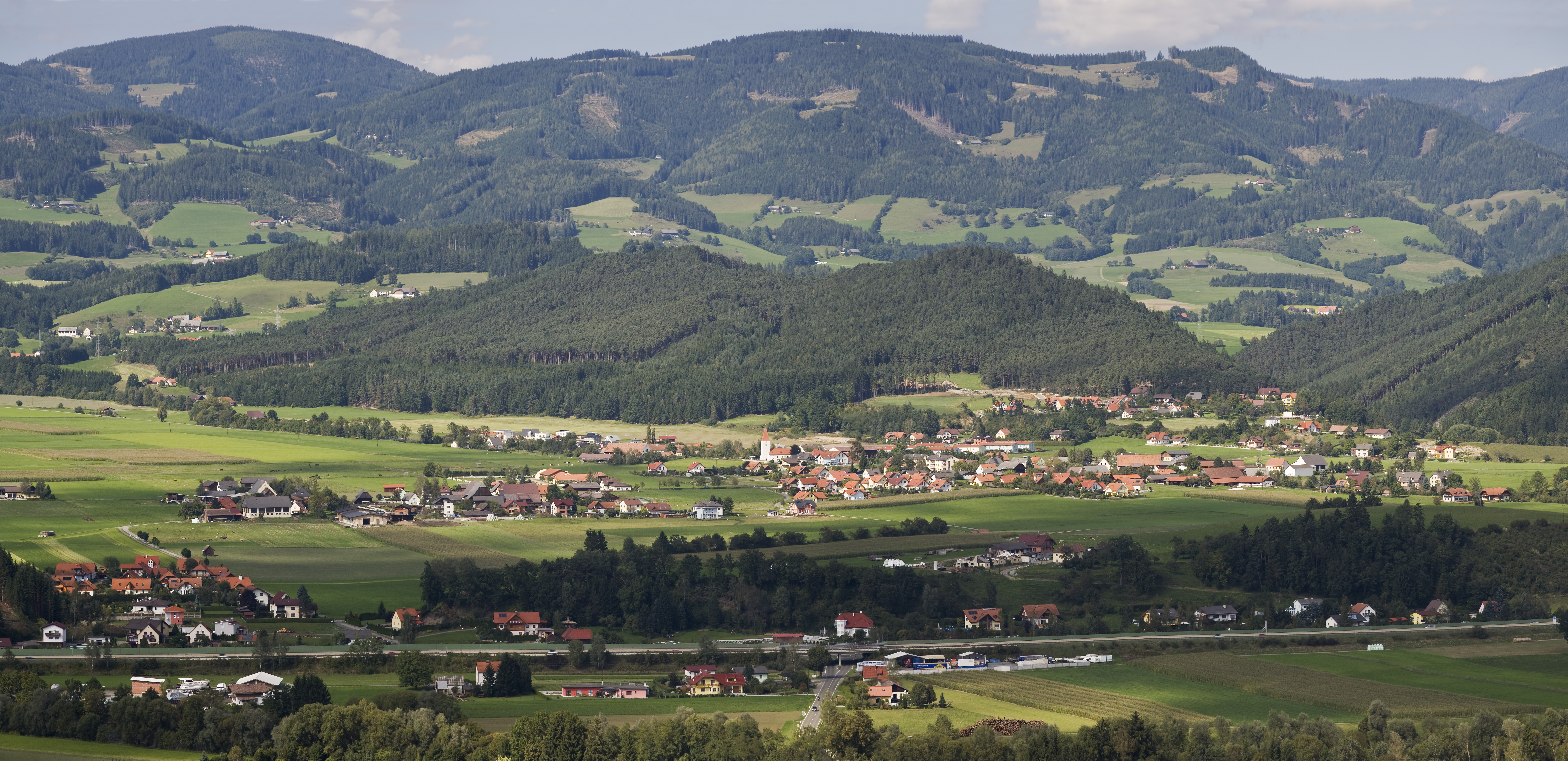 Feistritz bei Knittelfeld von Südwesten